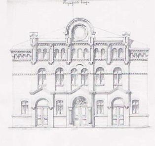 Rīgas Stabu ielā sinagoga